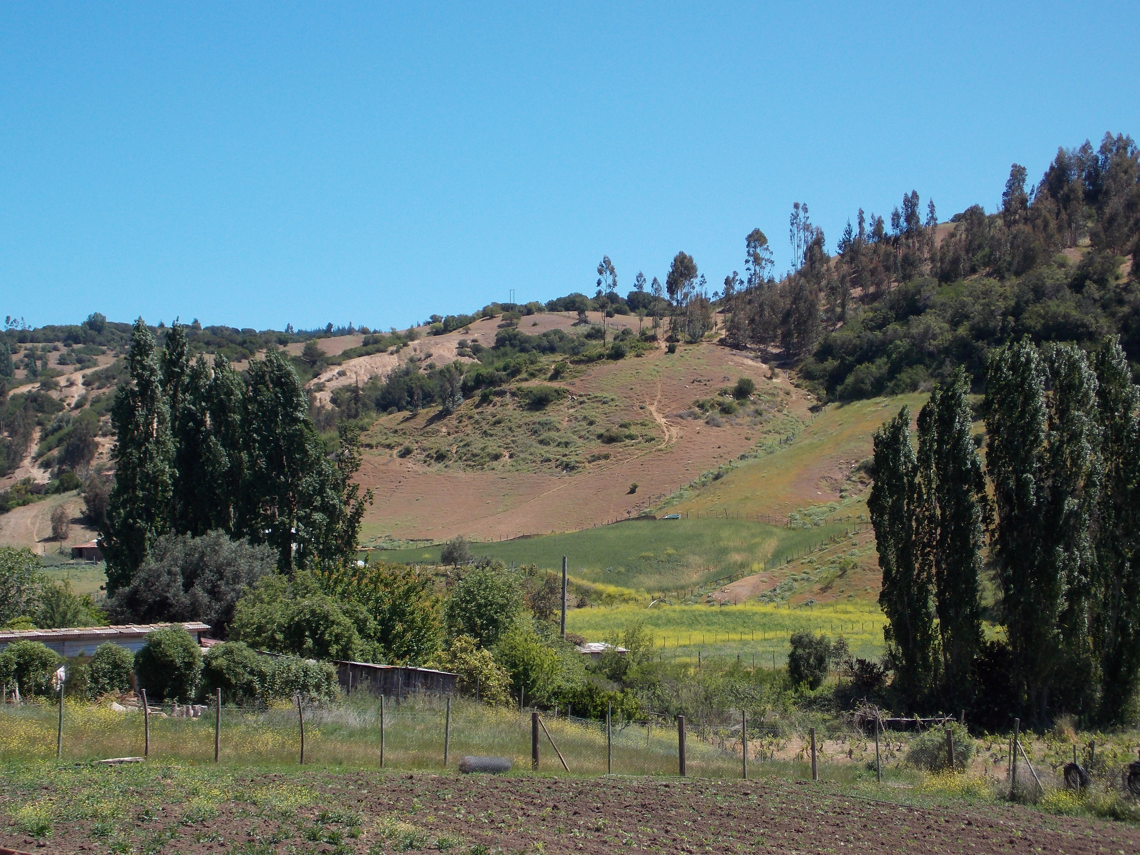 Valle de Pupuya, VI Región